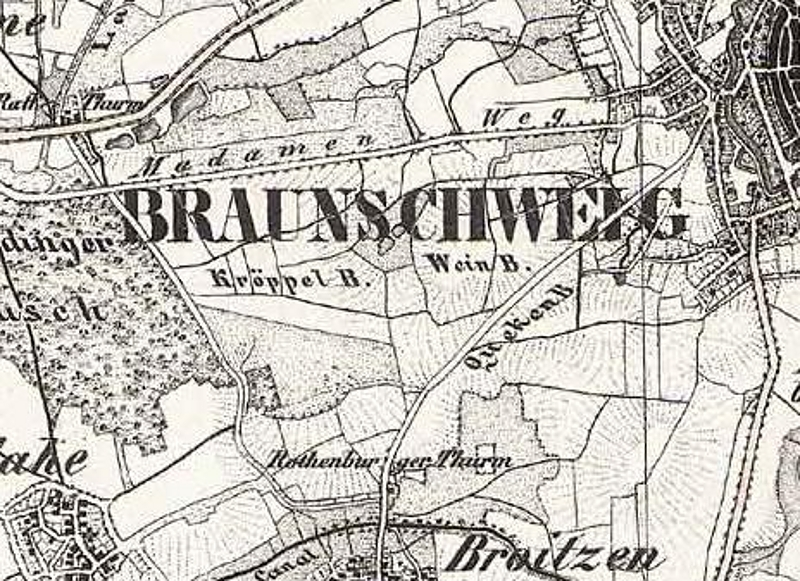 Der Bereich der heutigen Weststadt und des Westparks in der ersten Hälfte des 19. Jahrhunderts. Mit Kröppelberg, Weinberg und Quekenberg bzw. Queckenberg.